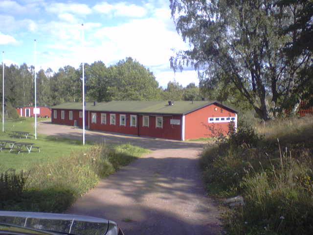 Frälsningsarméns Scoutförbunds lägergård Högaberg, som ligger utanför Örserum.